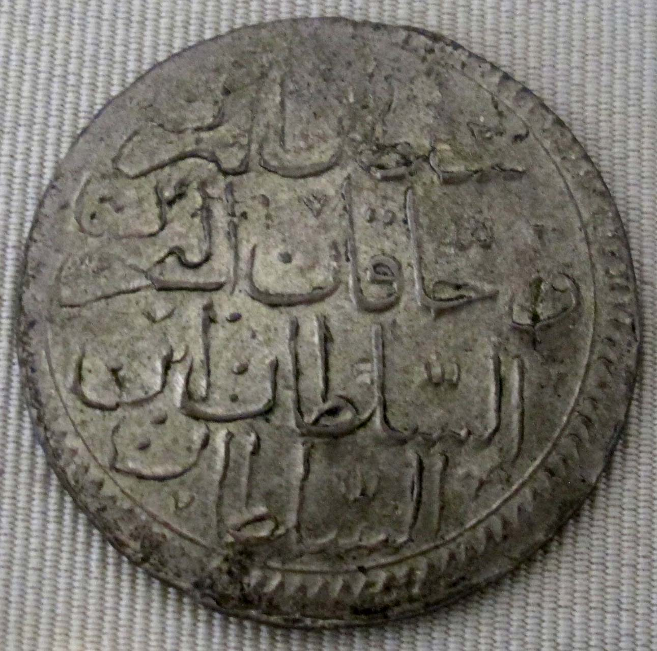 Turchia, solimano II, kurush, 1687-1691